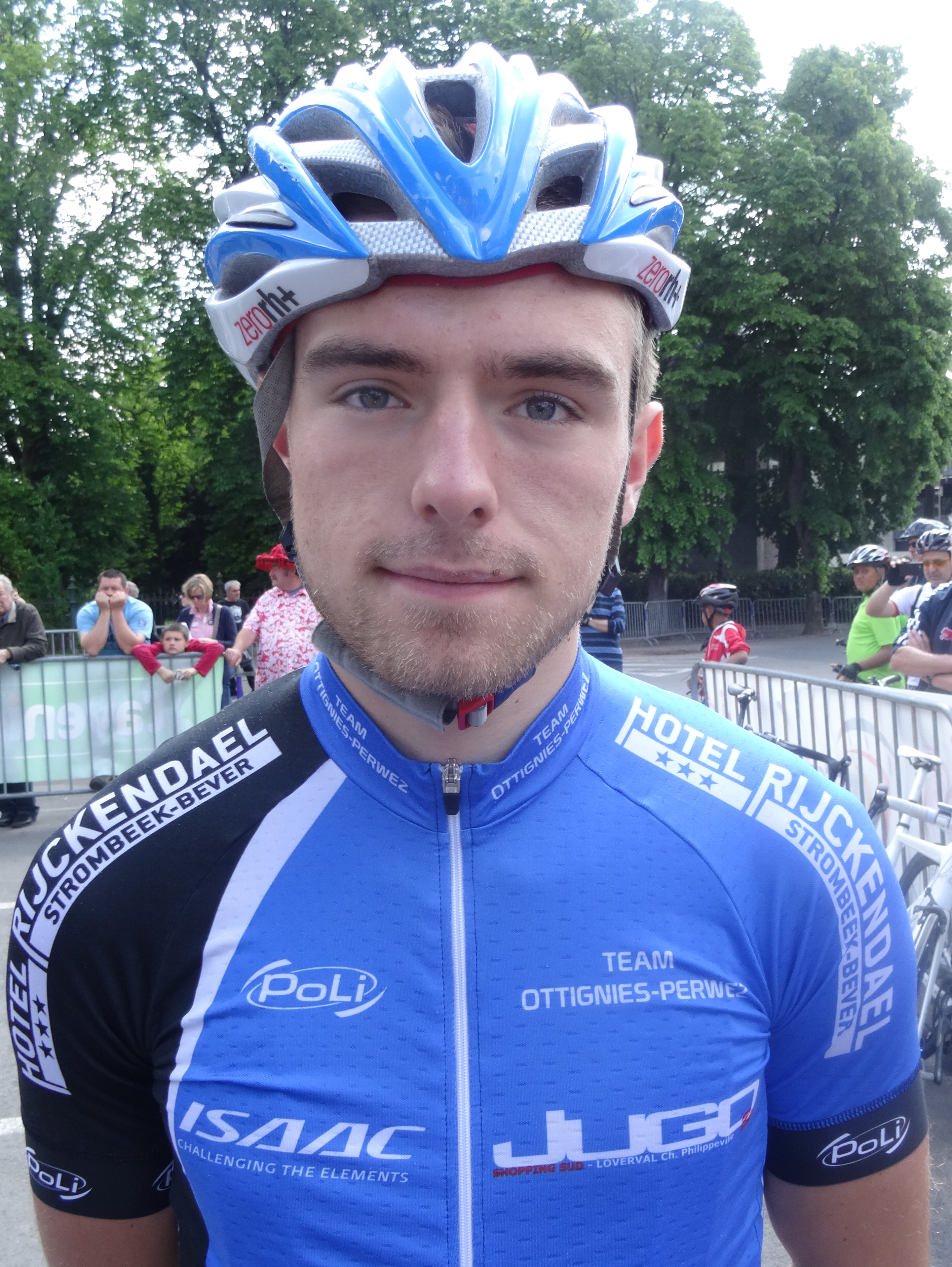 Reportage réalisé le samedi 17 mai à l'occasion du départ du Grand Prix Criquielion 2014 à Boussu, Belgique.